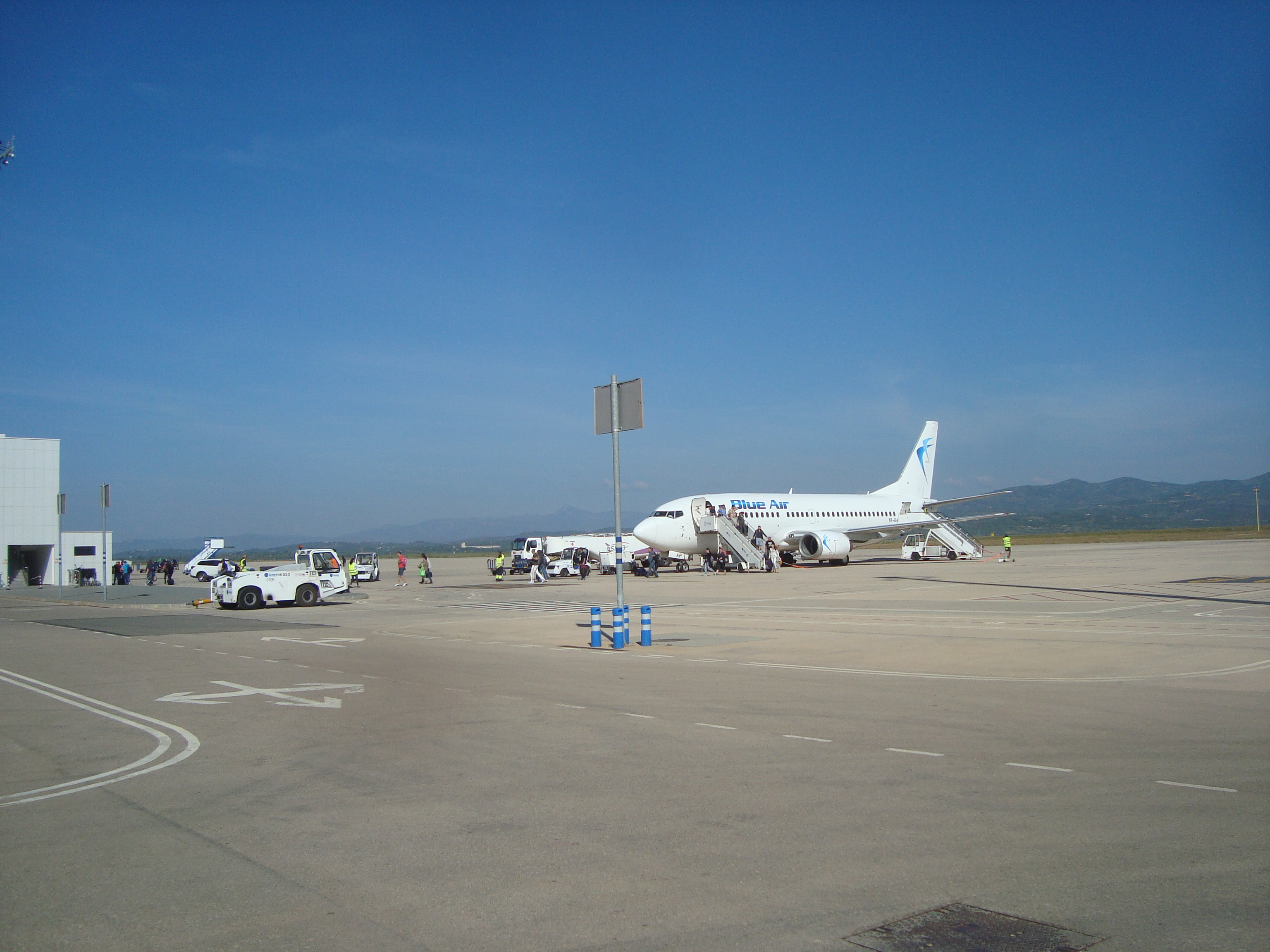 Blue Air YR-BAP Boeing 737. Aeropuerto de Castellón-Costa Azahar (España)